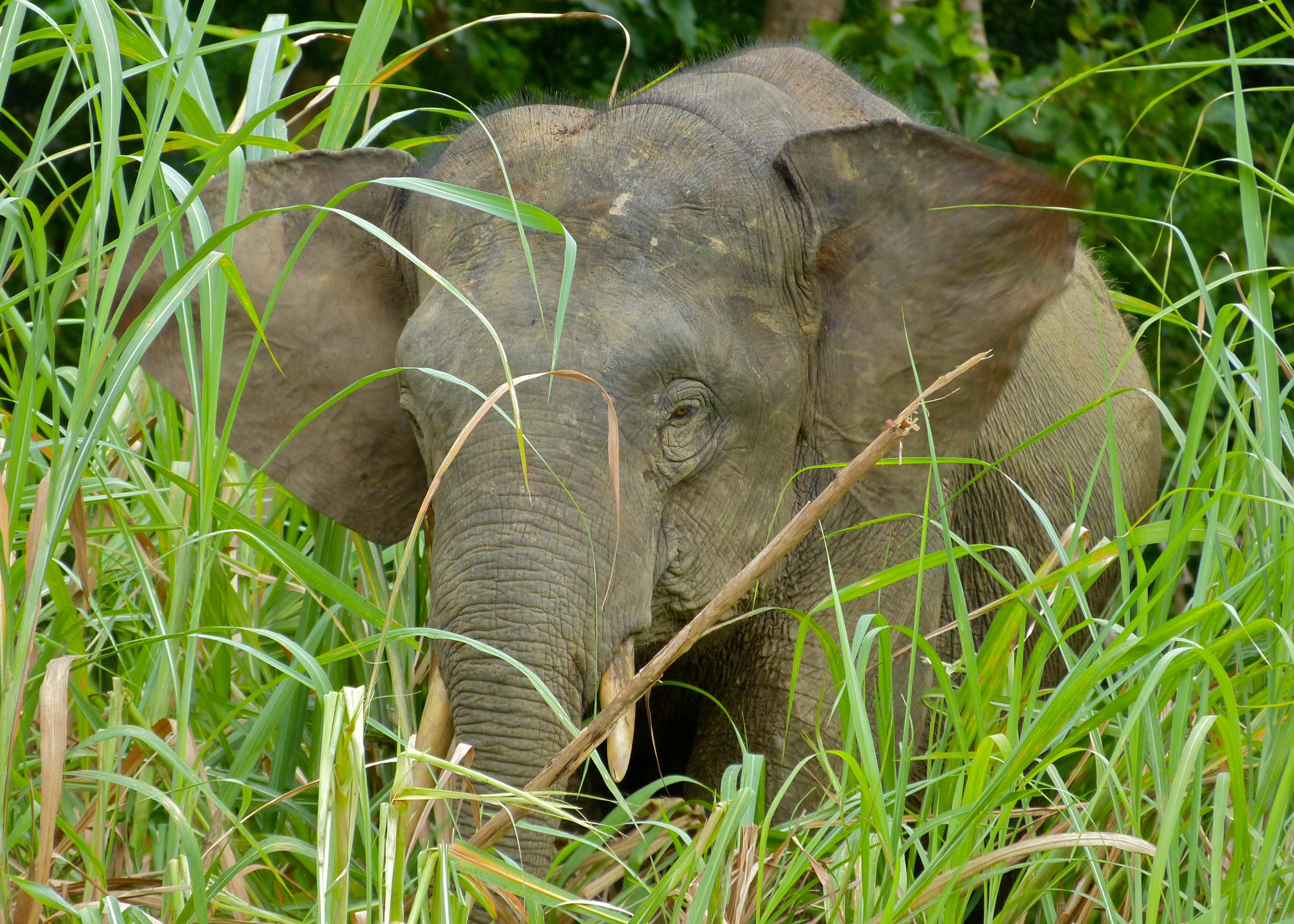 Kinabatangan River, Sukau, Sabah, MALAYSIA